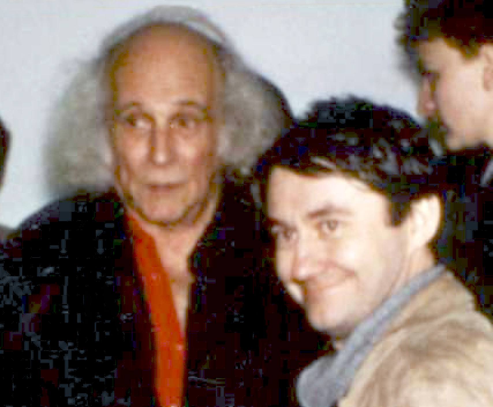 Alain Meilland et Léo Ferré qui sort de sa loge avant d'entrer en scène pour son tour de chant lors du Printemps de Bourges 1985